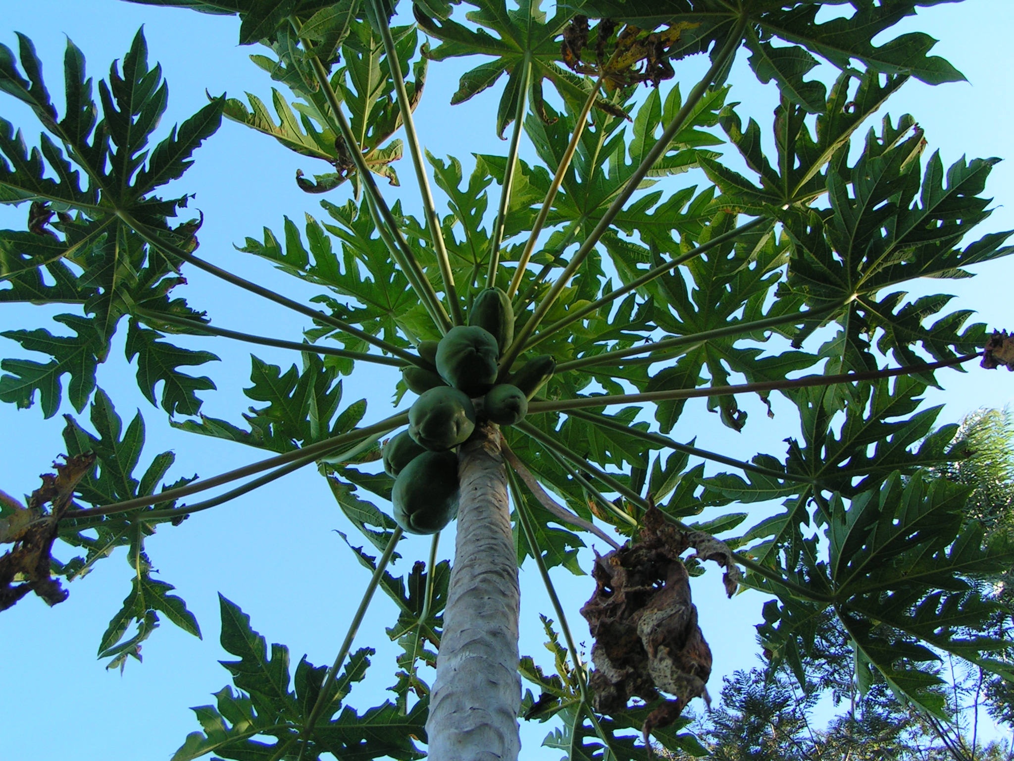 Follaje y frutos inmaduros de mamón (Carica papaya). Esta variedad, silvestre en Corrientes, es incomestible en crudo.